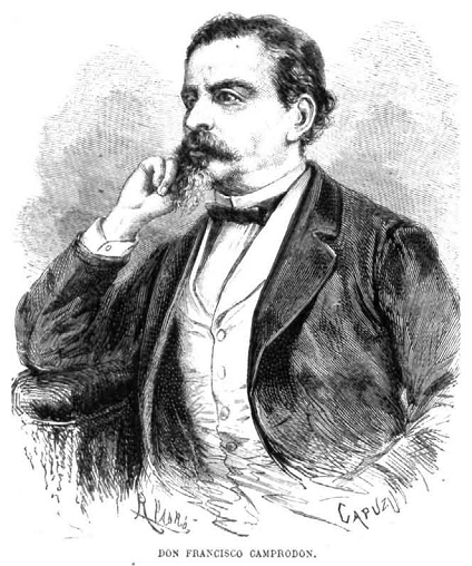 «Don Francisco Camprodón», en la revista española La Ilustración Española y Americana.